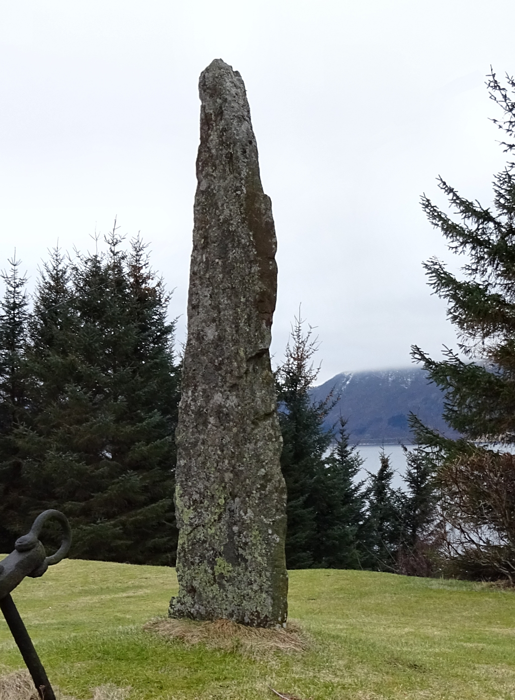 Bautastein Dysa, på Vartdal i Ørsta kommune